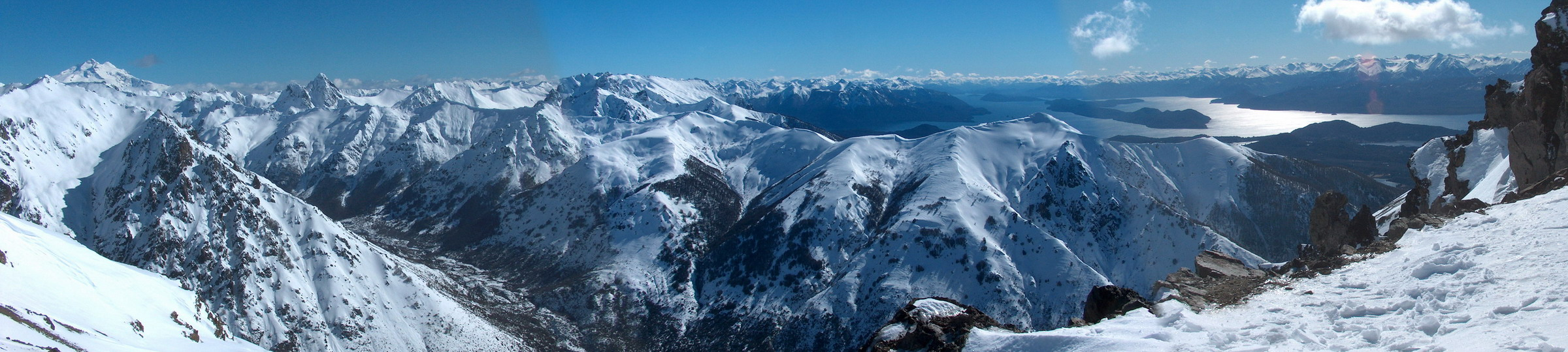 Vista panorámica desde el filo del cerro Catedral hacia el Oeste